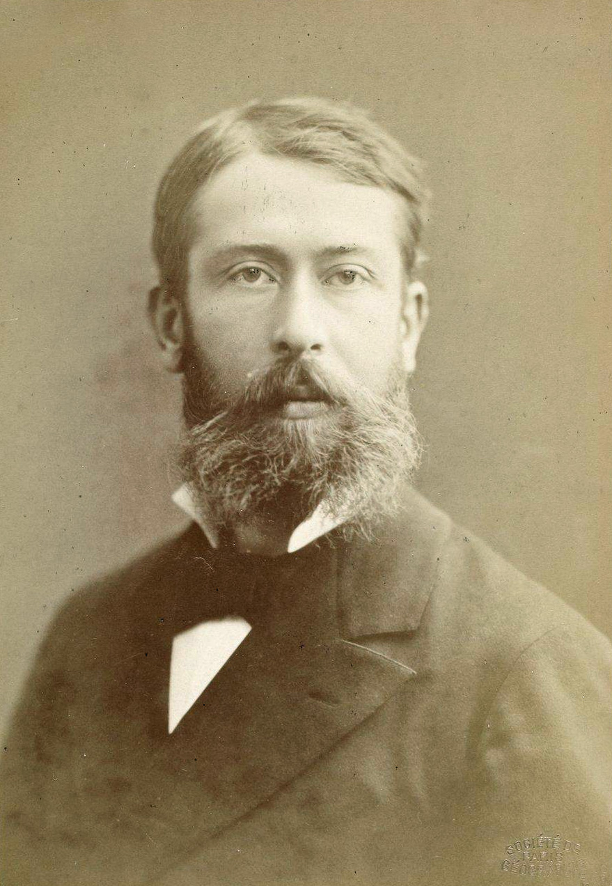 Noël Eugène Ballay. Bibliothèque nationale et universitaire de Strasbourg